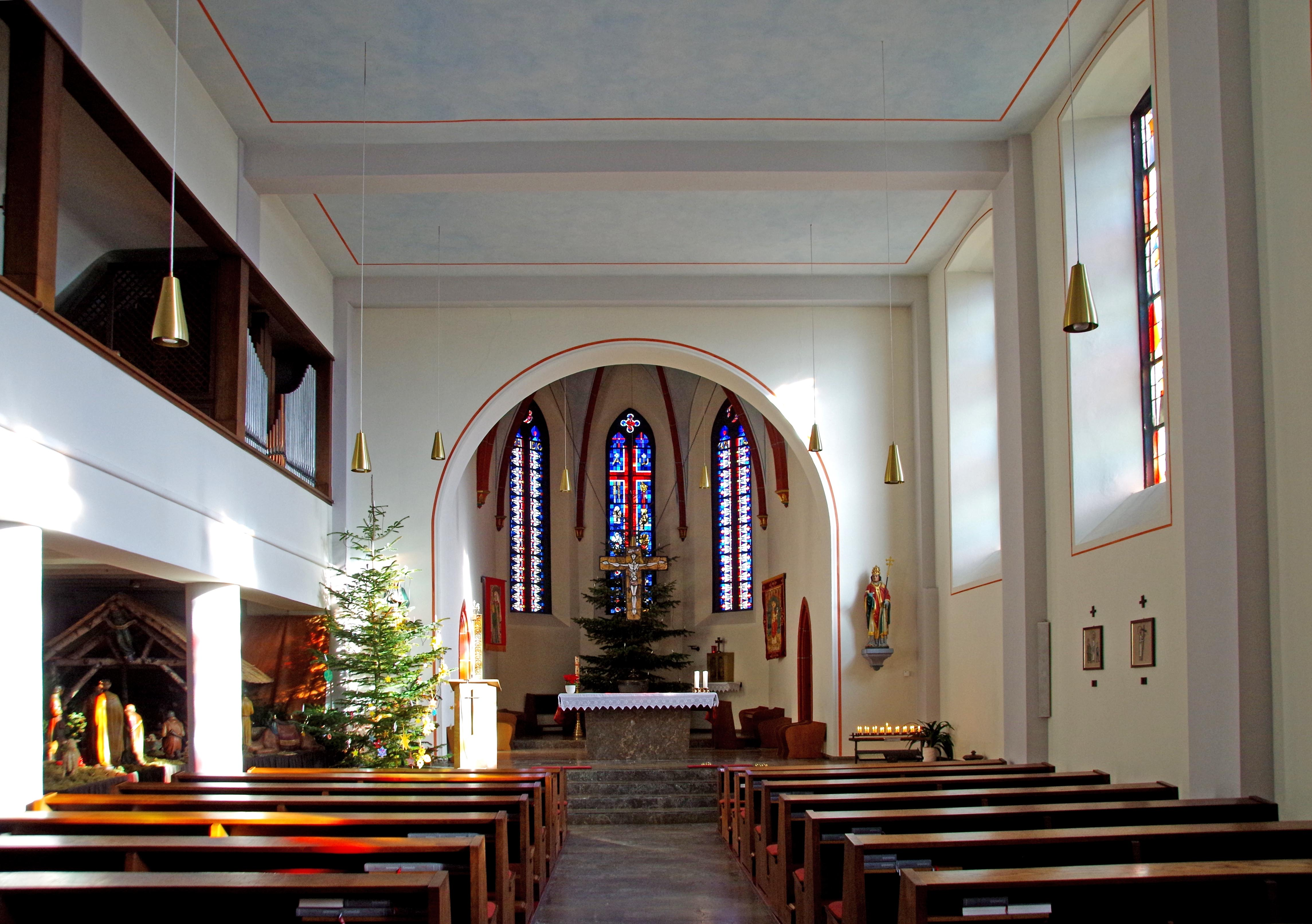 St. Cornelius (Rohren), Kirchenschiff, Blick zum Altar